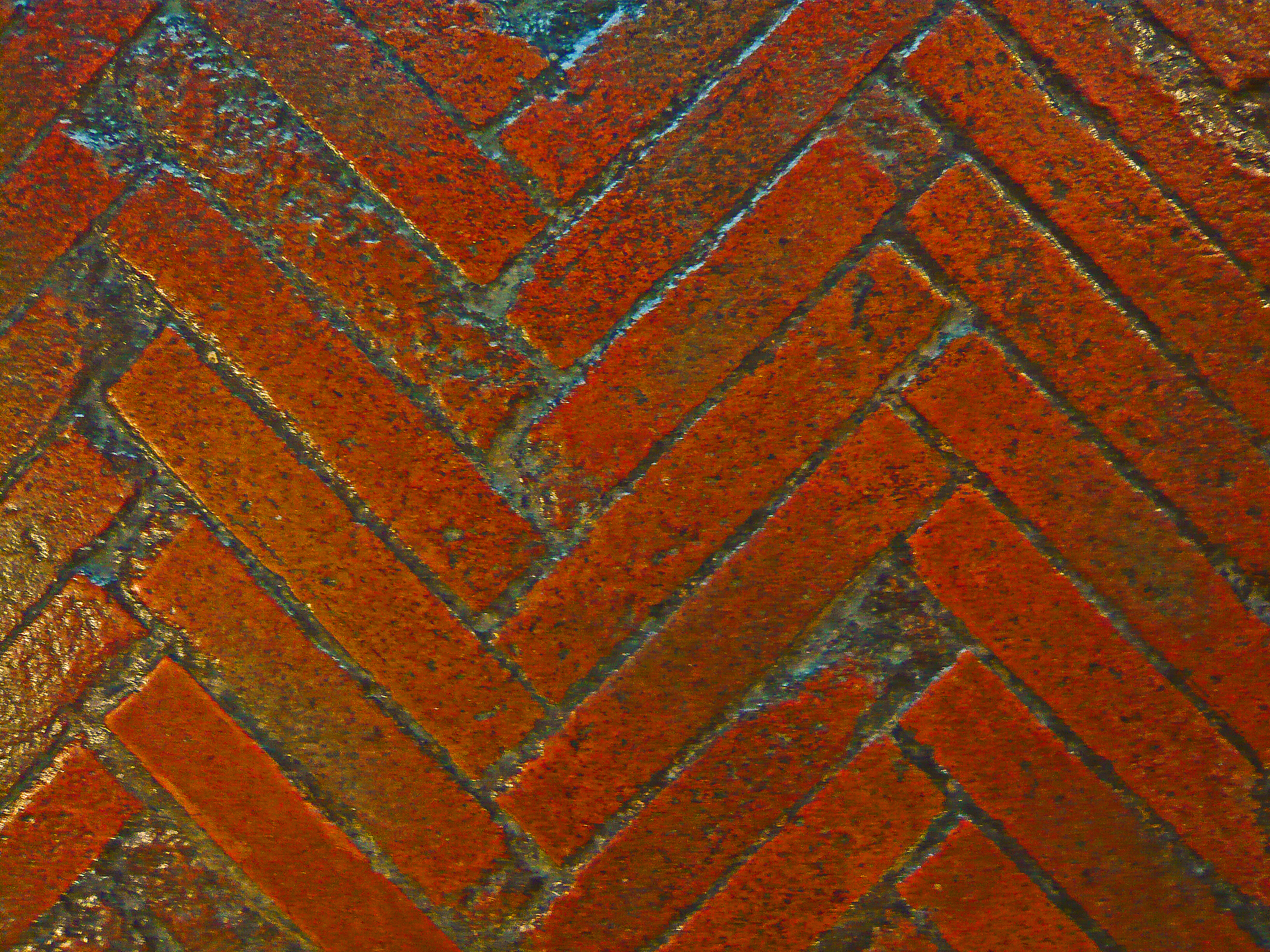 Antica pavimentazione in cotto dell'Impruneta che si trova all'ingresso dell'Hotel Monnalisa e più precisamente all'interno del portone d'ingresso in Borgo Pinti, strada fiorentina ricca di palazzi antichi anch'essi con ingressi in cotto.